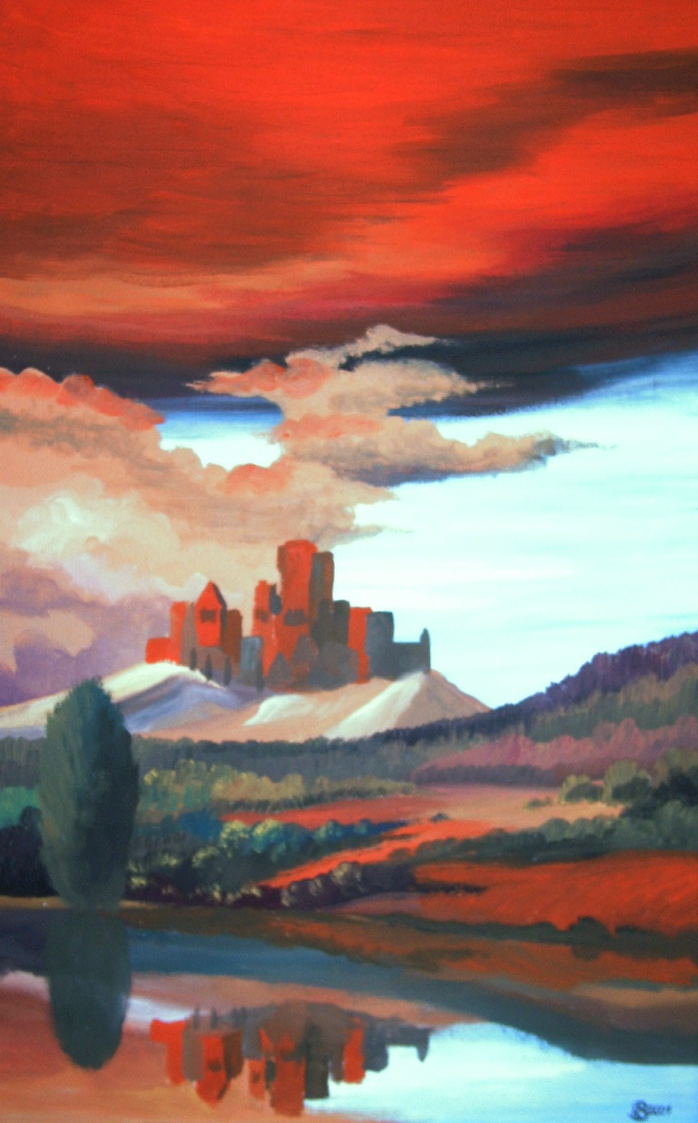 Reinhard Bergmann: Castellum incognita, 2001, Öl/Leinwand 50x80 cm, aus der „Burg-Phantas-Serie“